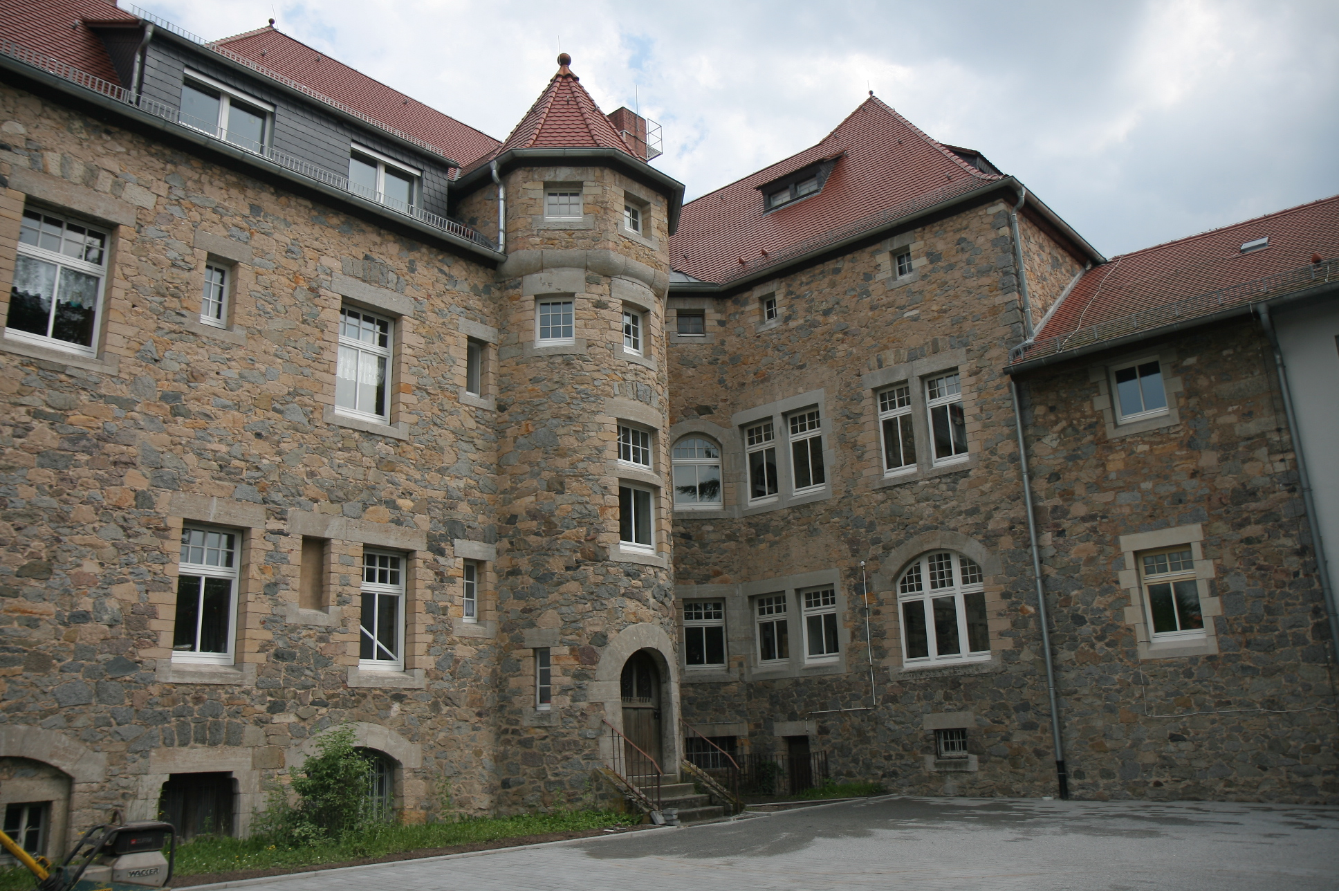 Gebäude (rückwärtige Ansicht) des Amtsgerichts Bensheim, Wilhelmstraße 26 in Bensheim.